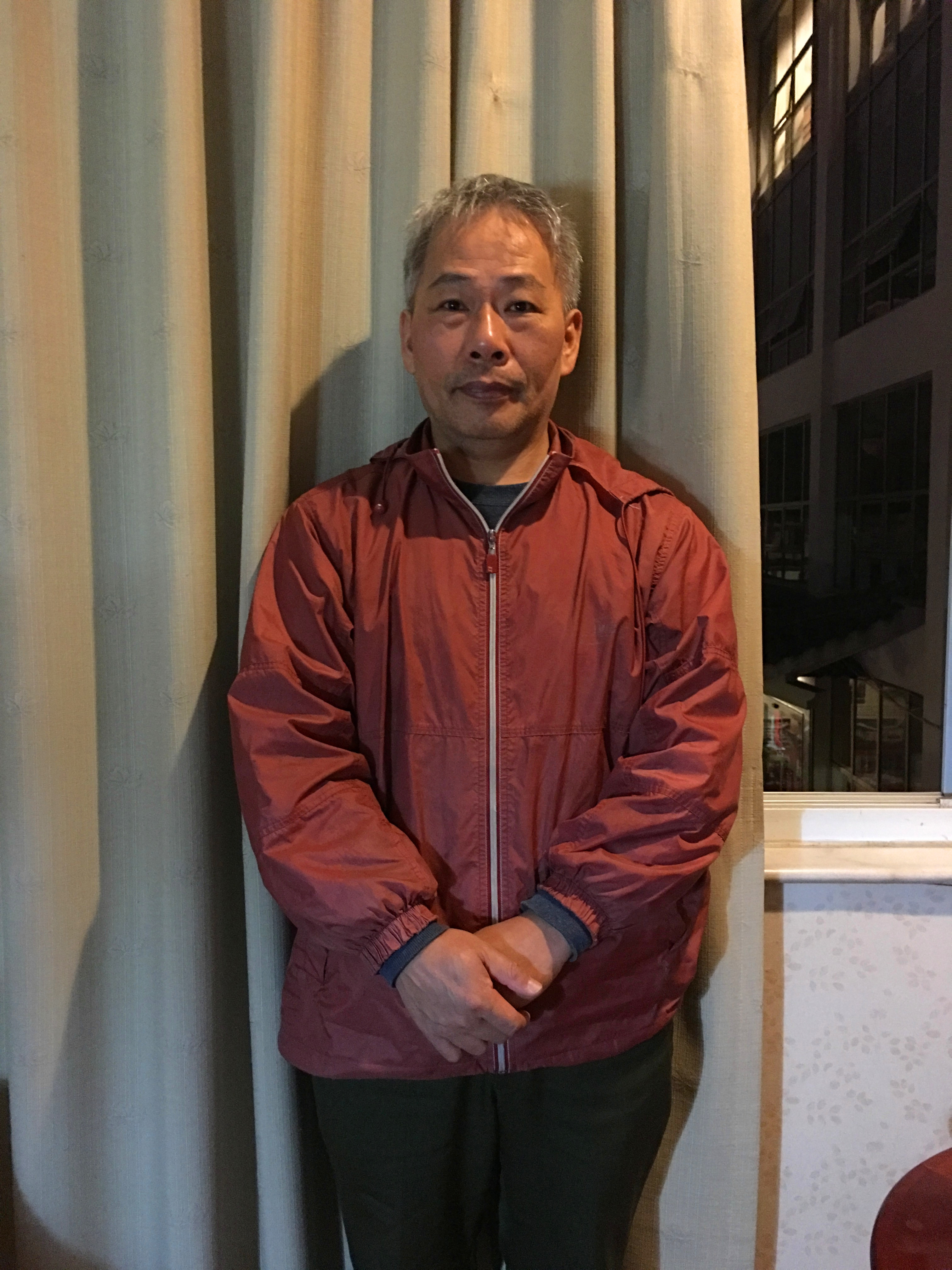 中文（中国大陆）: 于2015年12月6日在福州的林启生先生